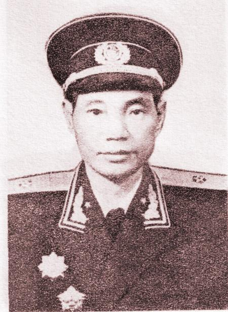 中文（中国大陆）: 曾生少将1955年授衔照